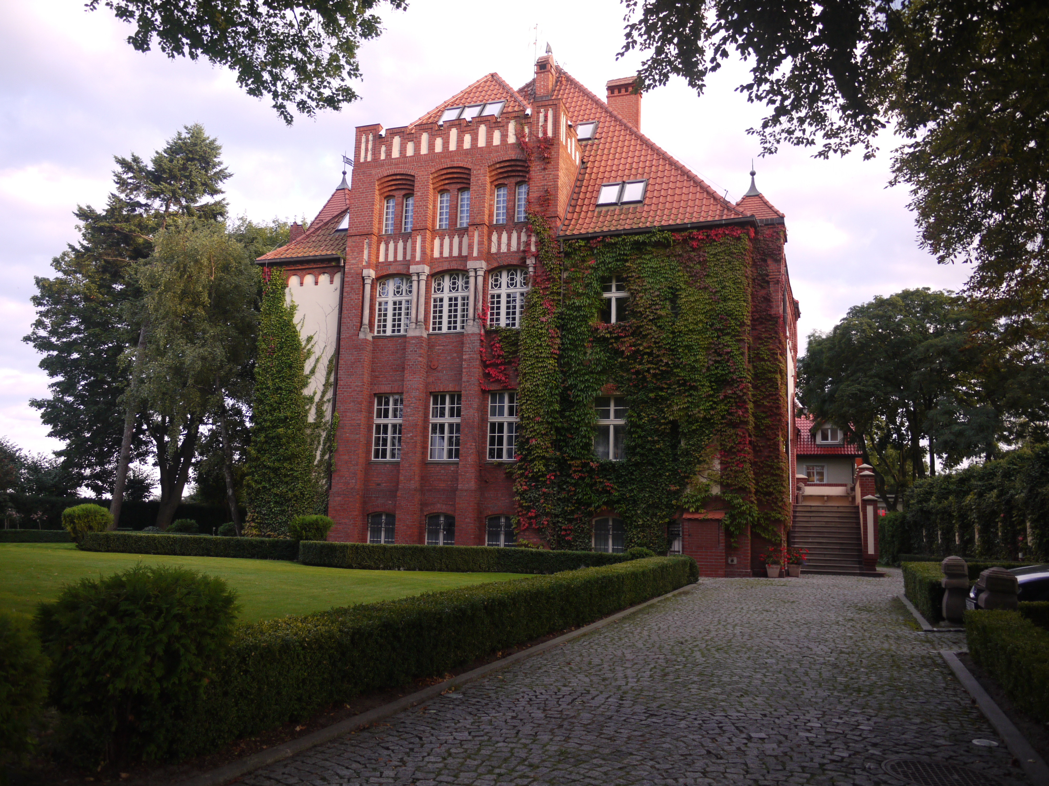 Willa, ul. Chrobrego 48, Sopot